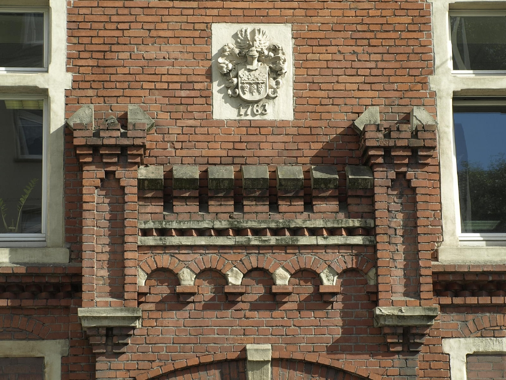 Uellendahler Straße 70 in Wuppertal, Quartier Ostersbaum. Ehem. Bandweberei A. u. Gebr. Frowein. Dekor über Haupteingang. Denkmalnr. D 797 This is a photograph of an architectural monument. 797